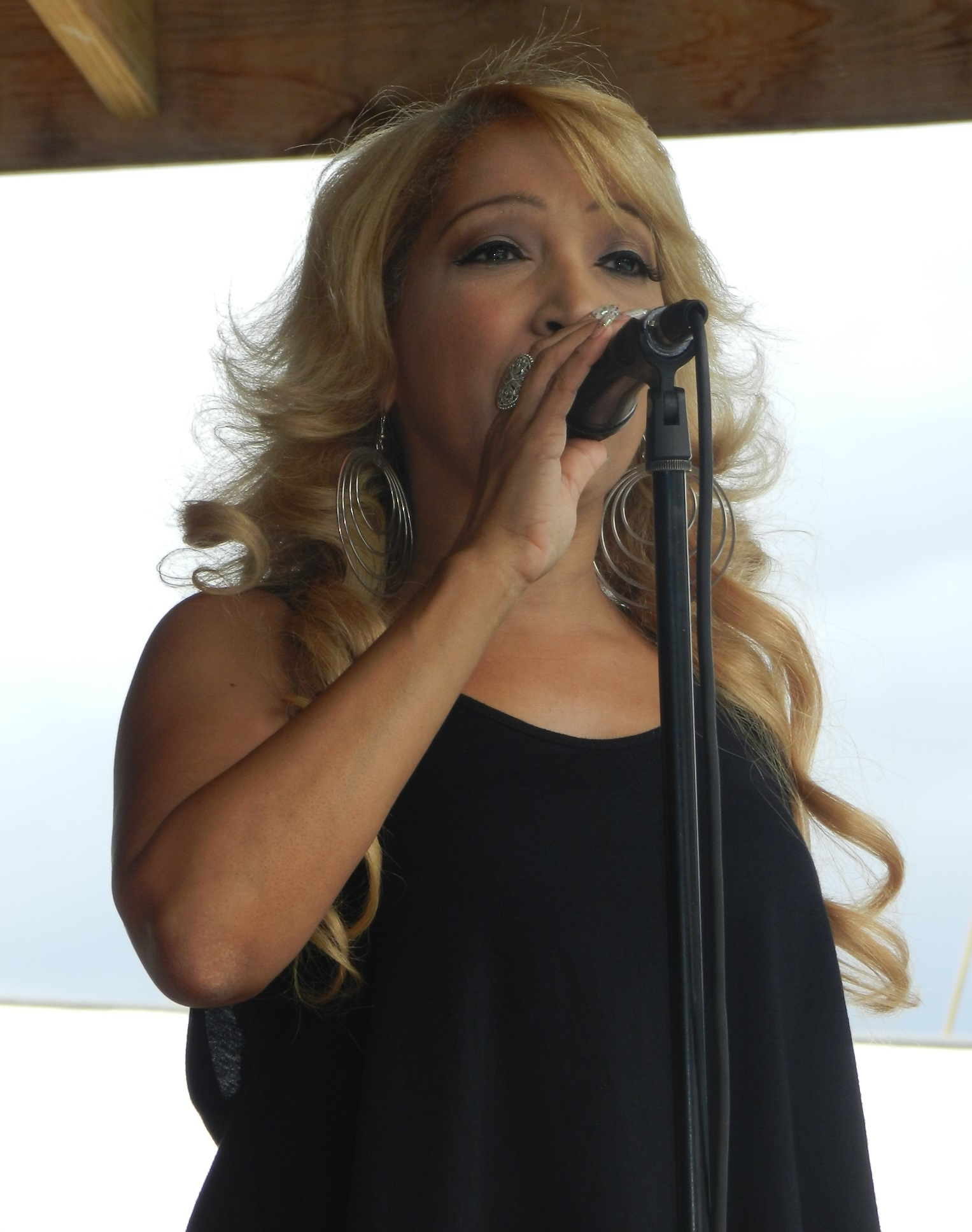 cantante, vocalista de la agrupación femenina Las Chicas del Can y coro de la merenguera dominicana Miriam Cruz.